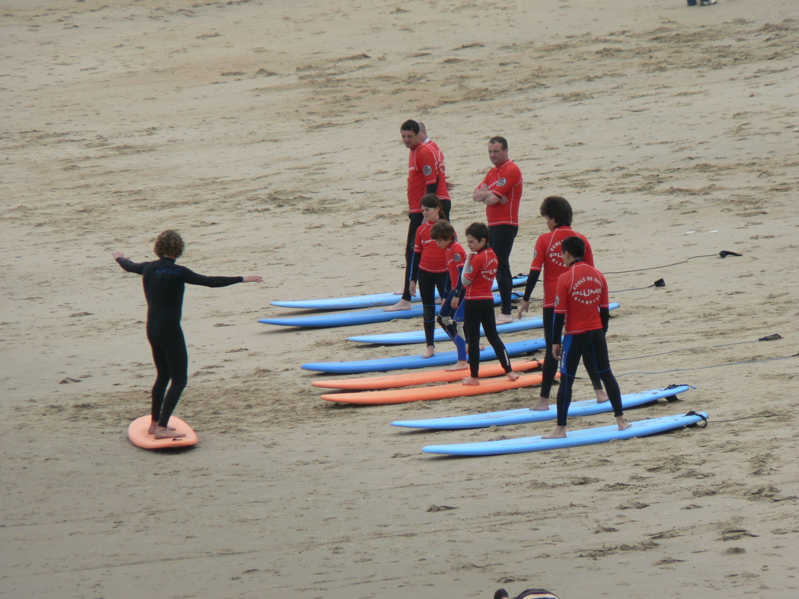 Biarritz